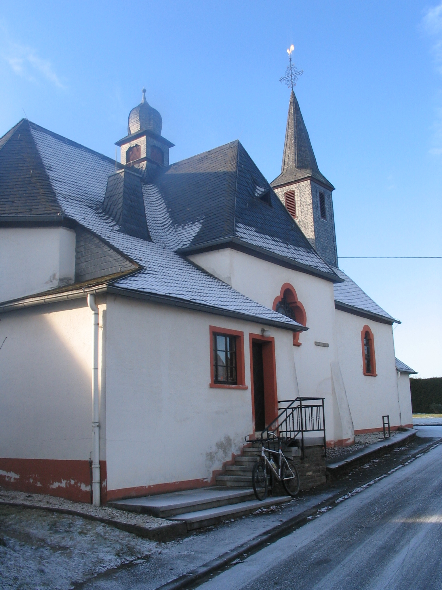 Kirche Sosberg